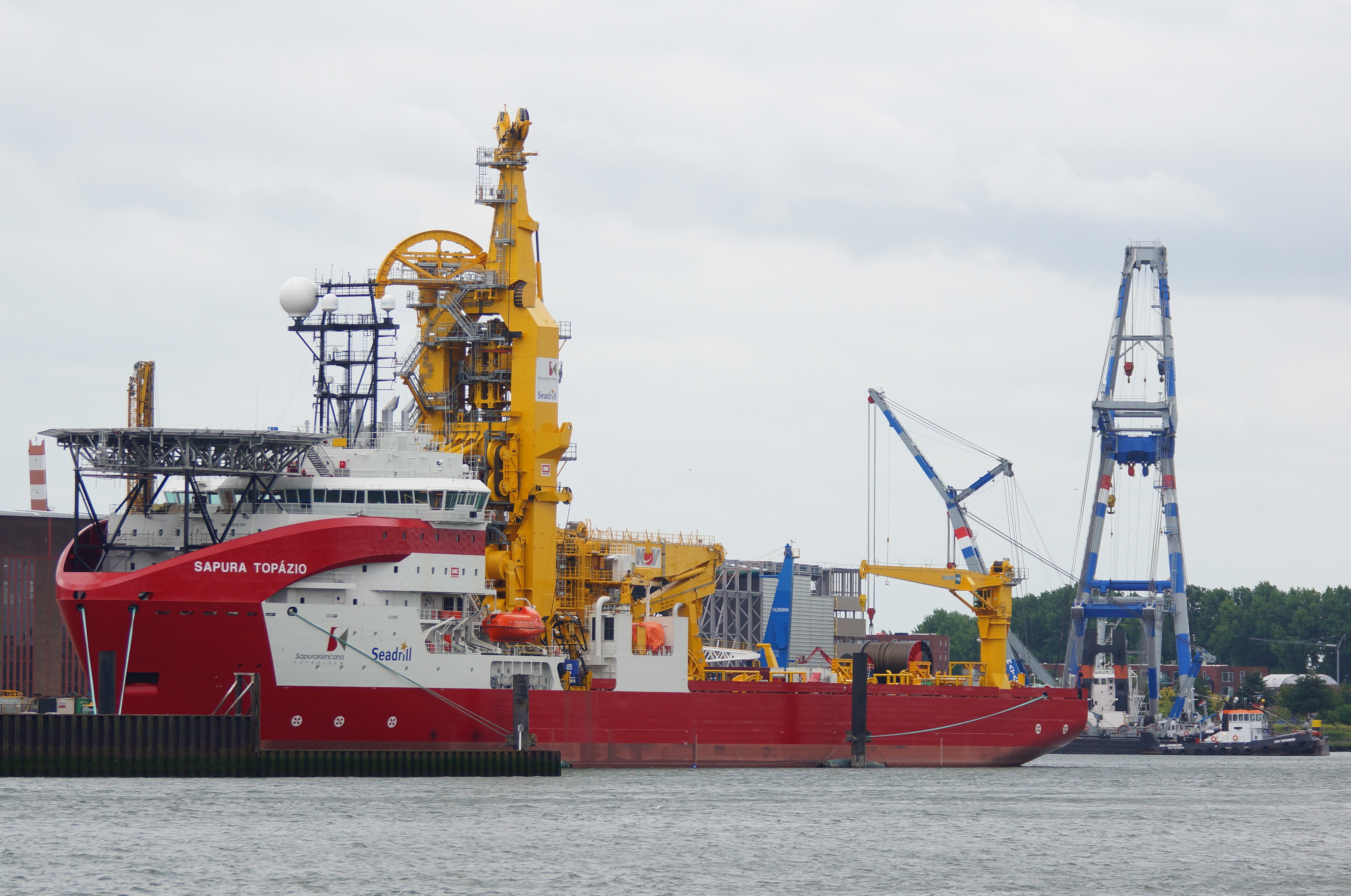 Heysehaven 6-7-2014